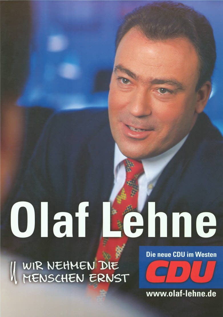 Olaf Lehne Wir nehmen die Menschen ernst Die neue CDU im Westen CDU Abbildung: Porträtfoto Plakatart: Kandidaten-/Personenplakat mit Porträt Objekt-Signatur: 10-009 : 1519 Bestand: Landtagswahlplakate Nordrhein-Westfalen (10-009) GliederungBestand10-18: Landtagswahlplakate Nordrhein-Westfalen (10-009) » CDU Lizenz: KAS/ACDP 10-009 : 1519 CC-BY-SA 3.0 DE